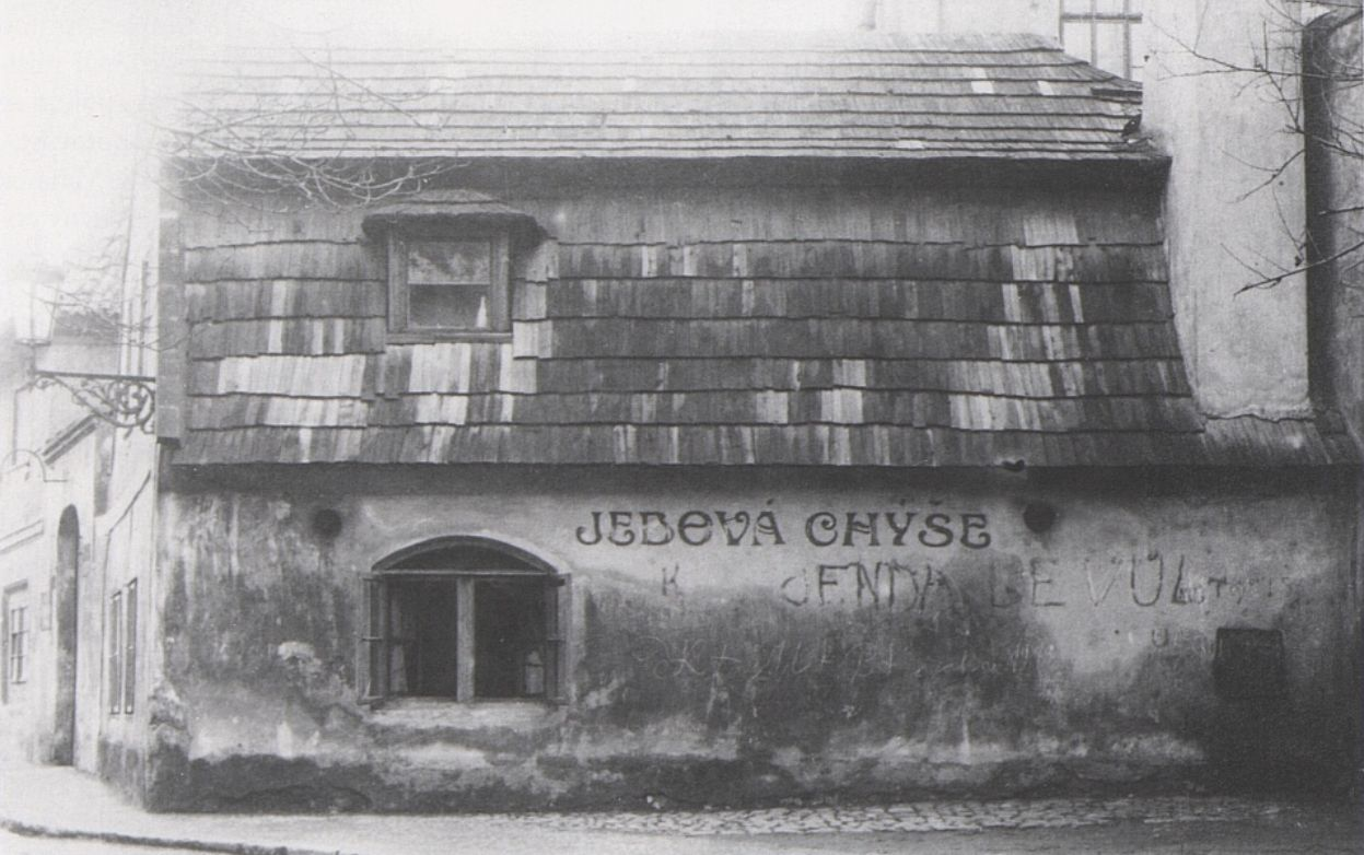 Jedová chýše, nechvalně proslulá hospoda u kostela sv. Apolináře v Praze.